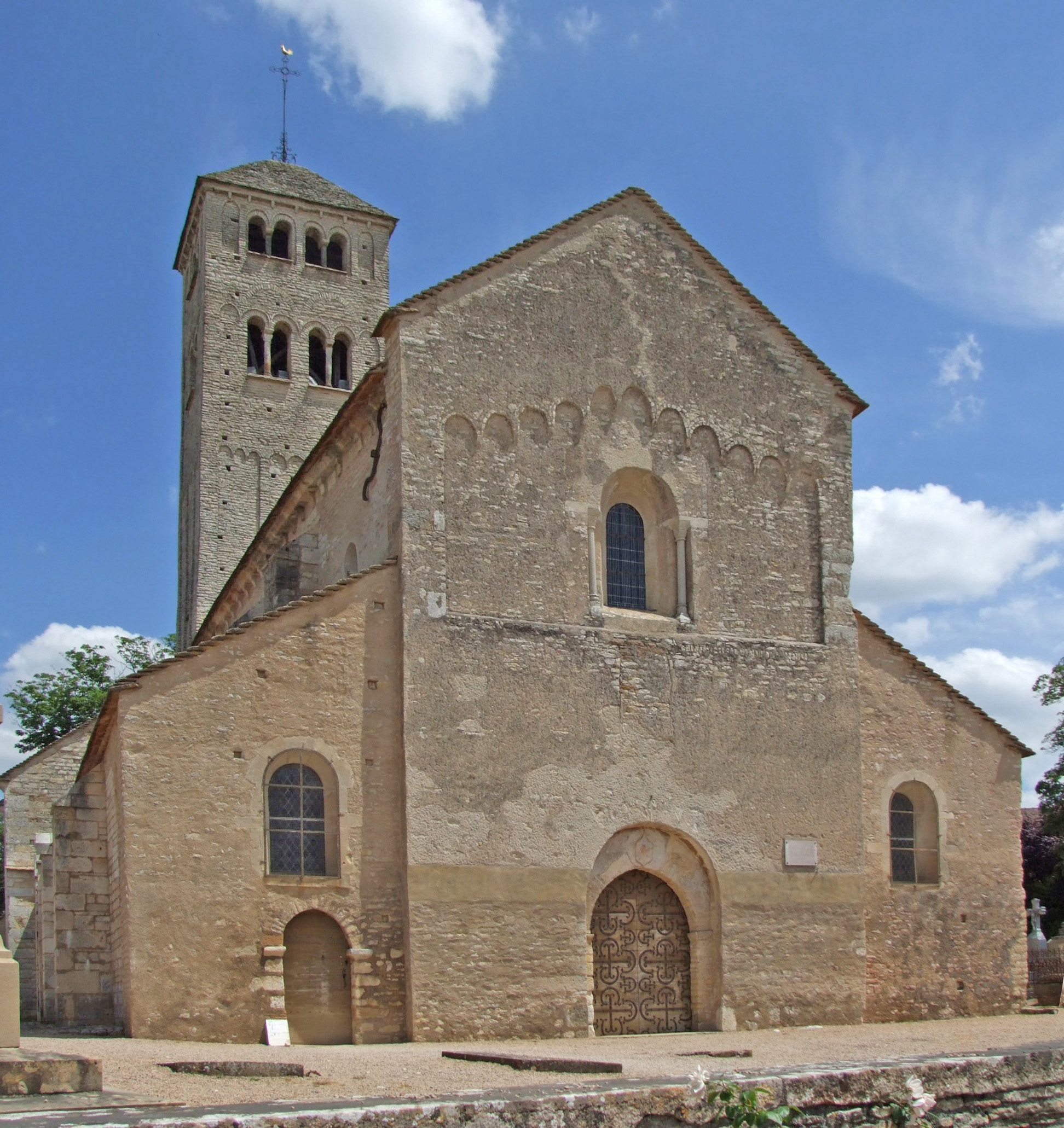 Église St-Martin de Chapaize, Bourgogne, France